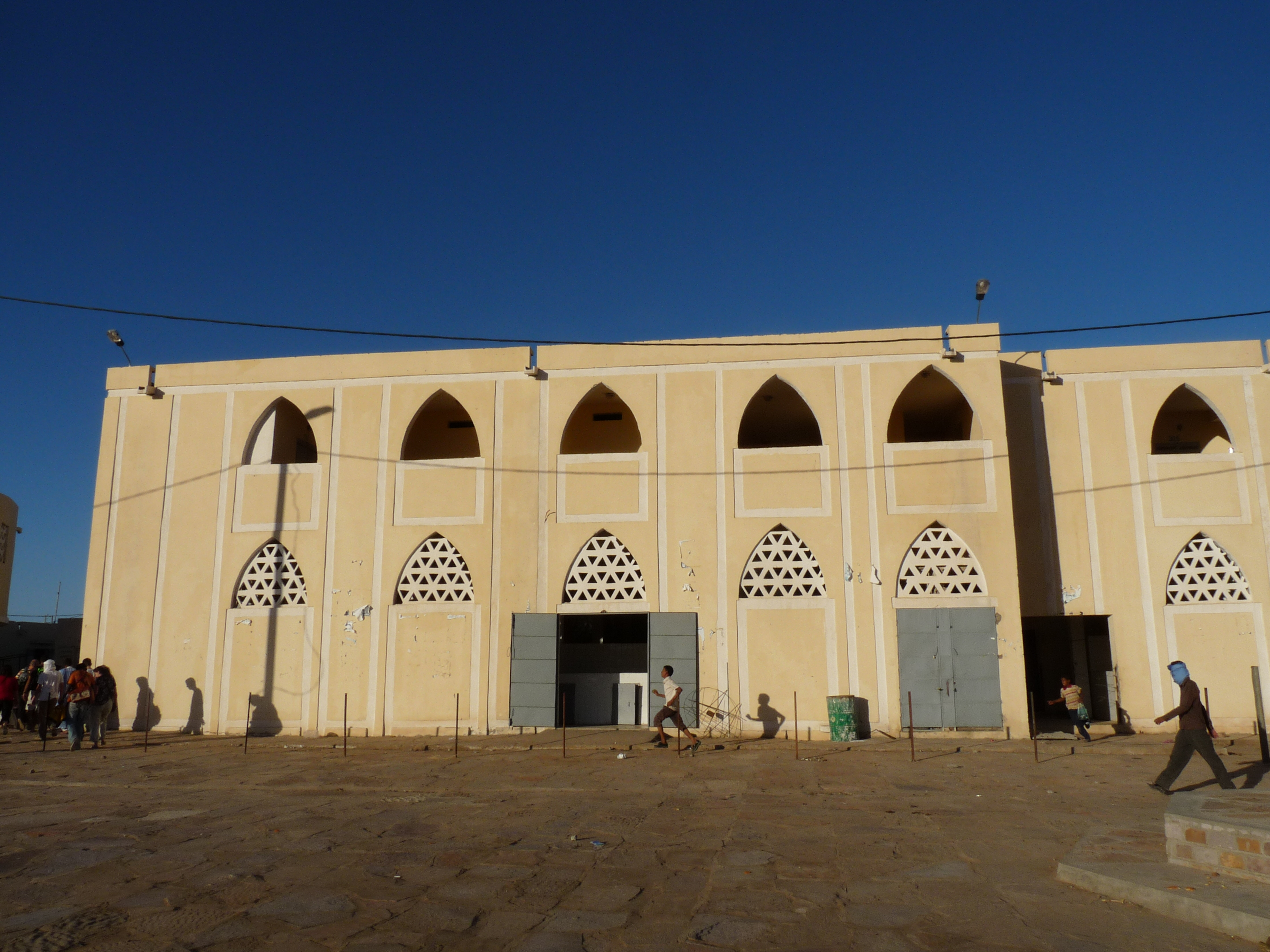 Marché d'Atar (Mauritanie)